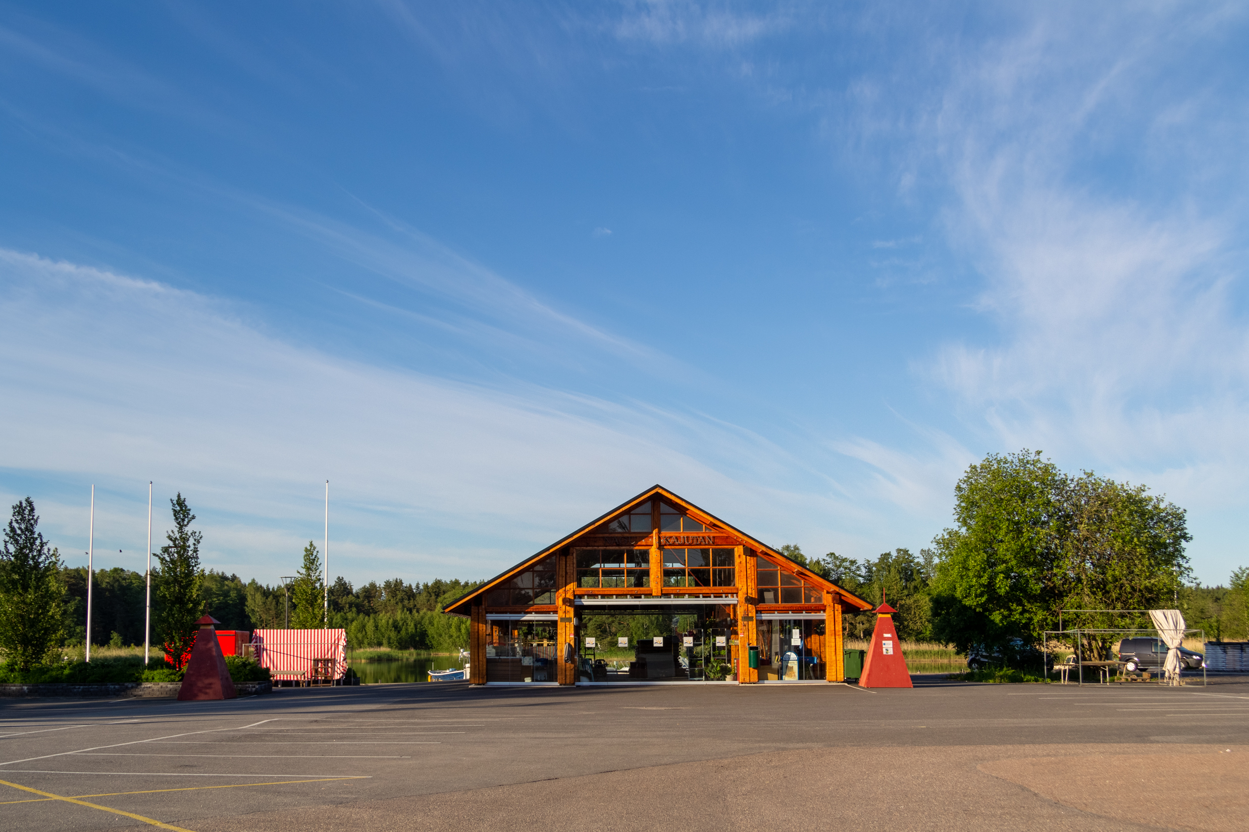 En bild på torget vid södra hamnen i Nagus centrum.